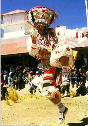 Danzante de tijera